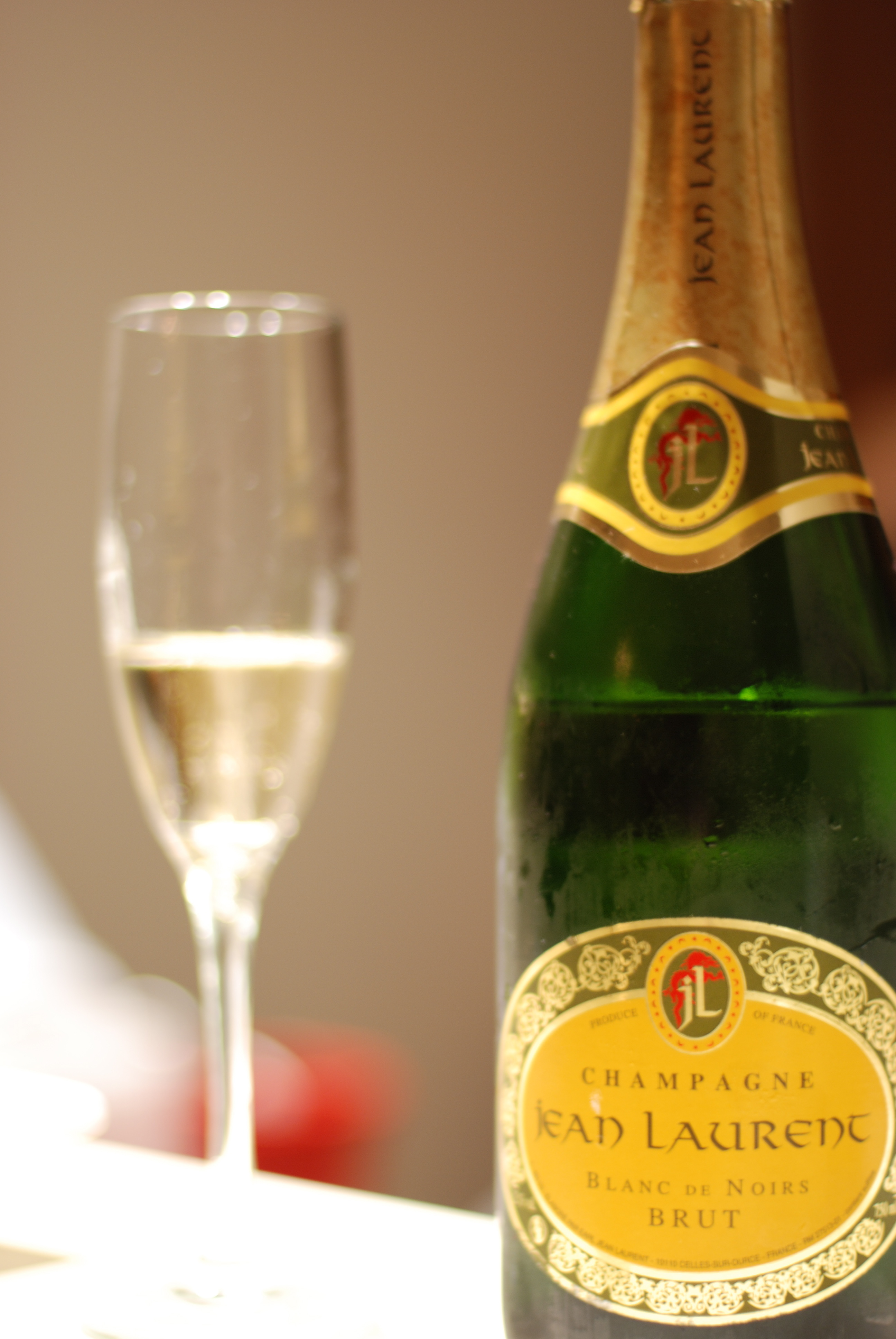 A brut Blanc de noir Champagne